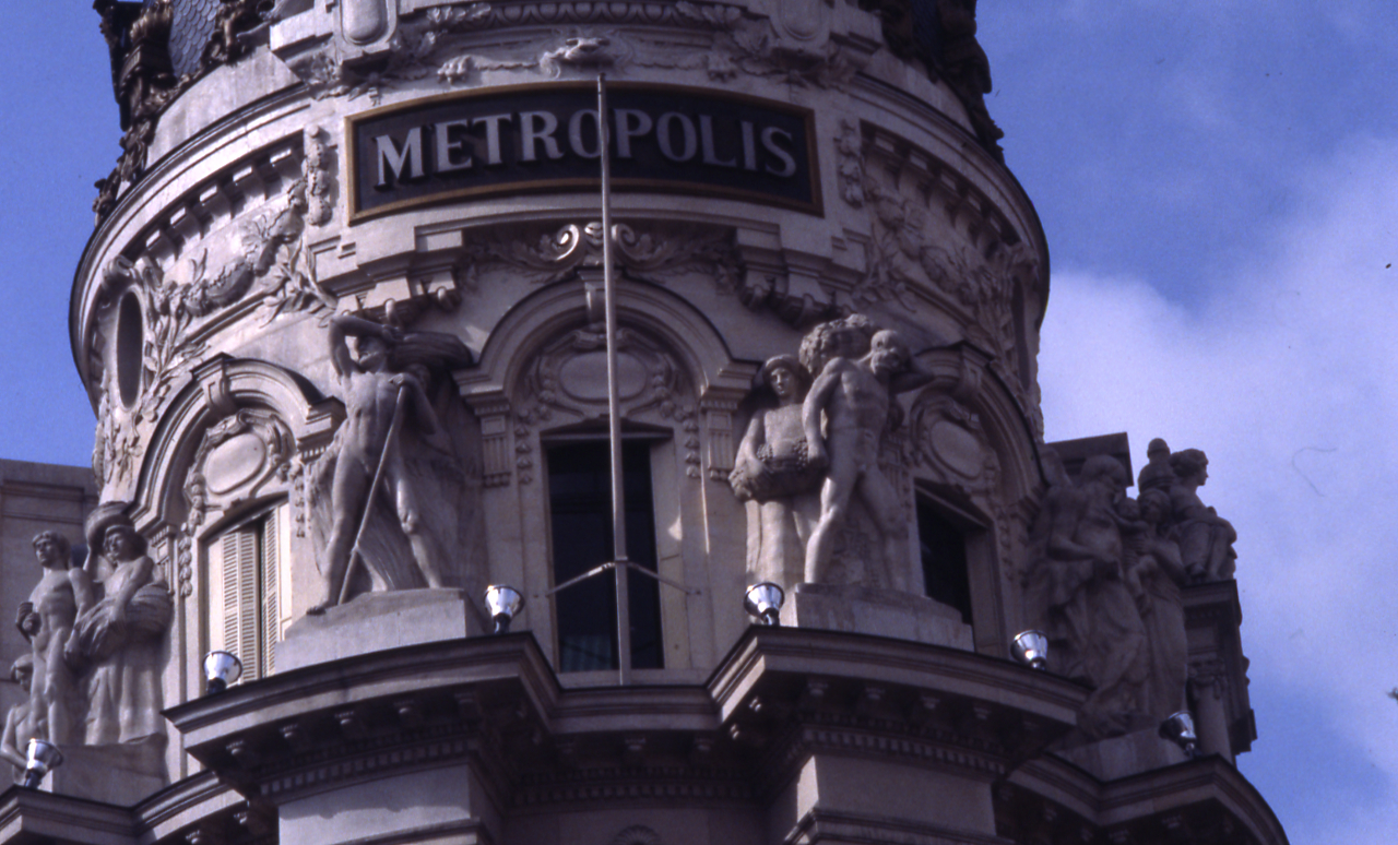 Servizio fotografico : Madrid, 1980 / Paolo Monti. - Foglio: 1, Fotogrammi complessivi: 20/20 : Diapositiva, sviluppo cromogeno/ pellicola ; 35 mm. - ((Iscrizione manoscritta su una striscia di cartoncino bianco: "Spagna/ Madrid" all'interno del contenitore. - Fonte: Rubrica di Paolo Monti: Diapositive 24x36mm (1948-1982), presso Archivio Paolo Monti. Rubrica con elenco soggetti e numeri di inventario (da 1 a 1000) corrispondenti ai fogli a tasche in pvc in cui sono contenute le diapositive.